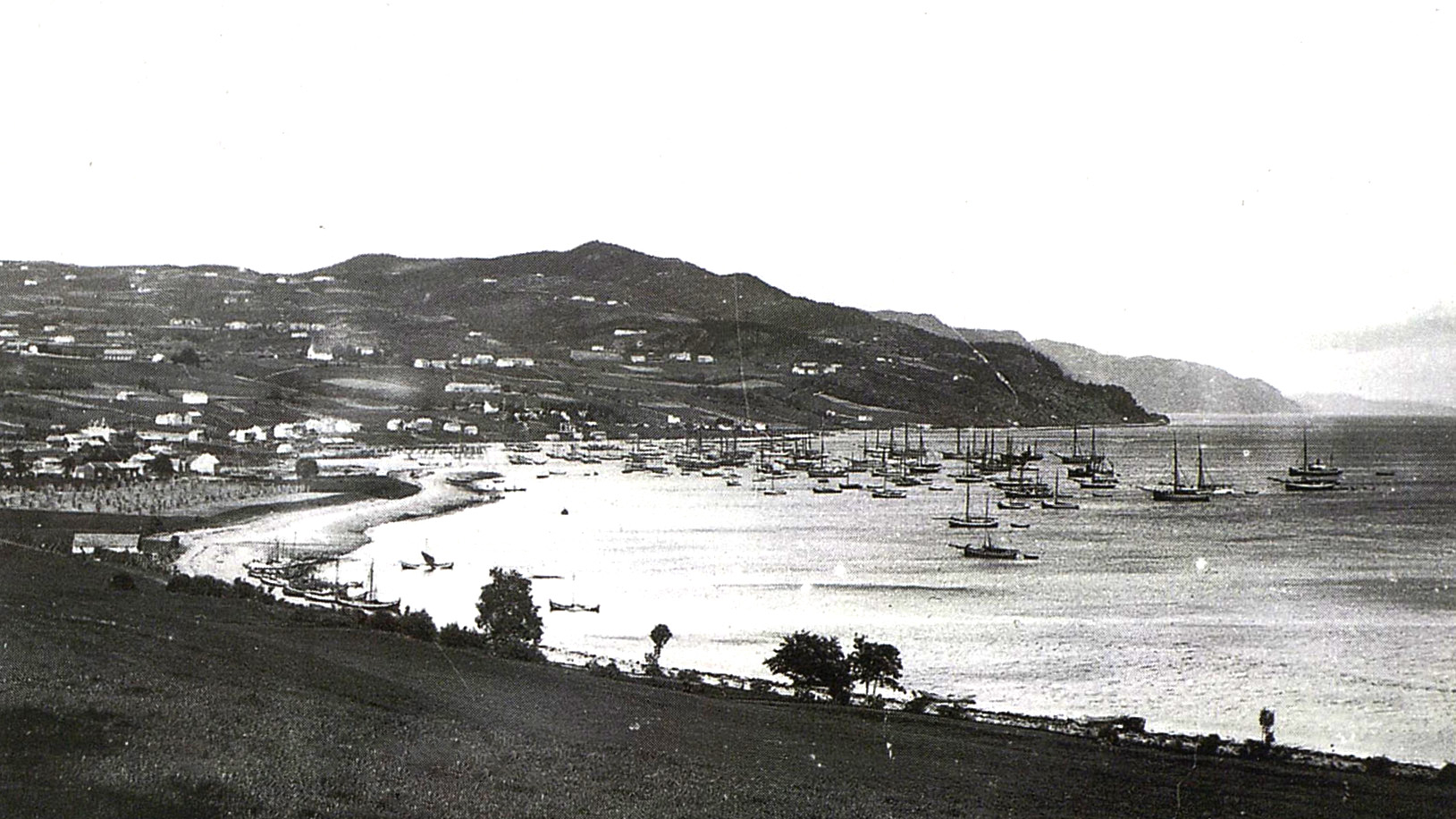 Leksvik sett fra Grande ca 1898.